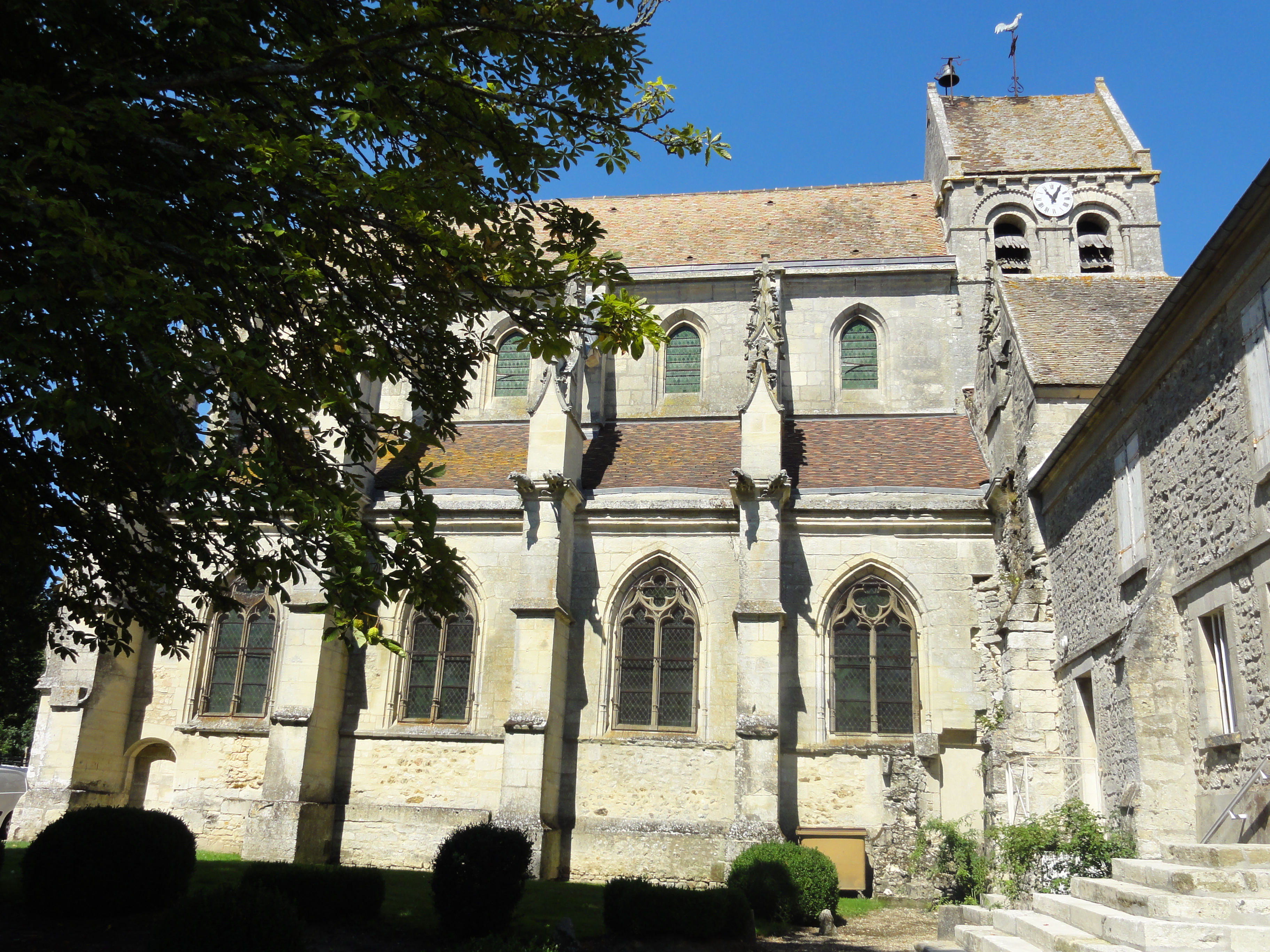 Église Saint-Denis de Serans - voir titre.